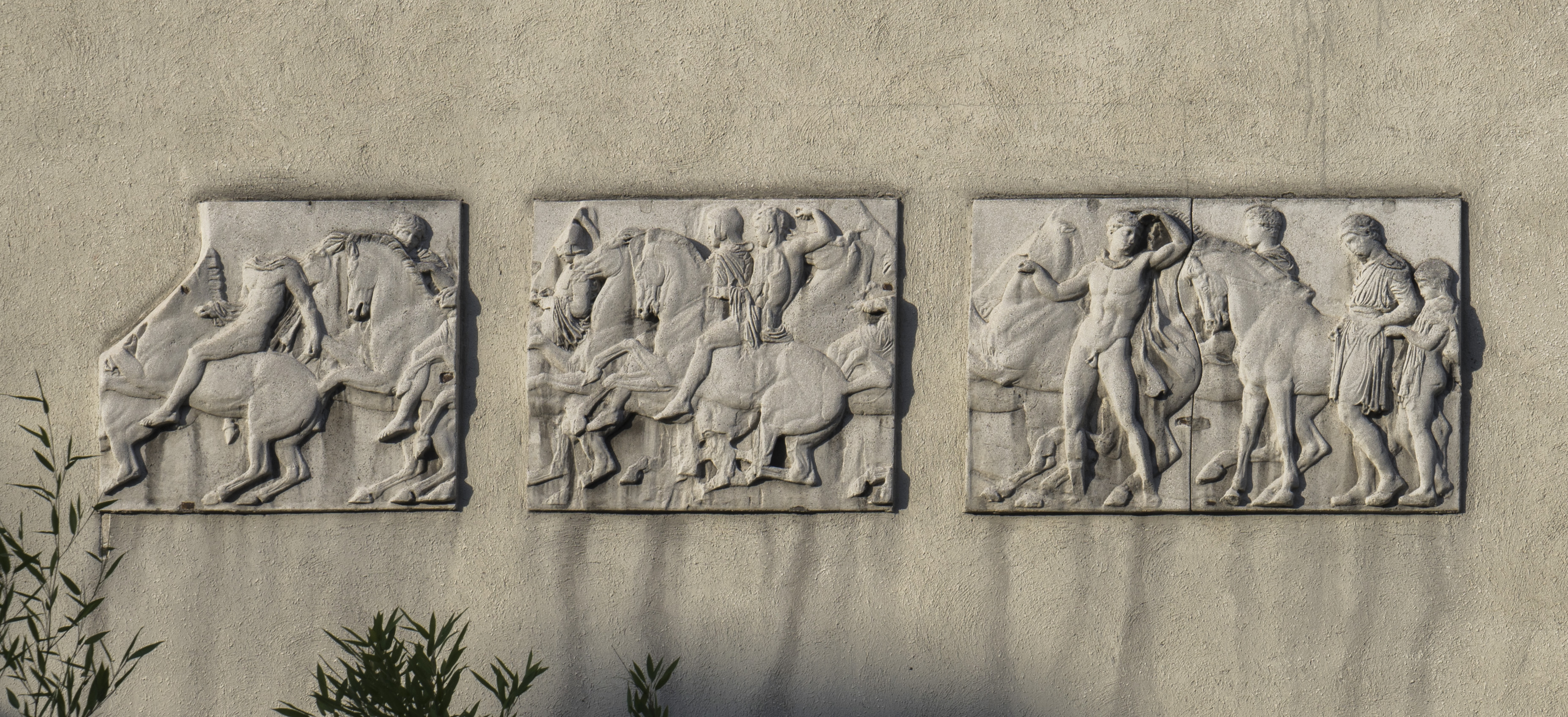 Haus Rufer, Fries. Wien-Wiki: An der Straßenfassade befindet sich die Kopie eines Parthenonfries-Reliefs von Friedl (offenbar Theodor). Der Fries existierte bereits bevor das Haus gebaut wurde (Theodor Friedl starb 1900).